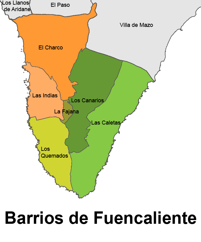 Mapa Barrios de Fuencaliente de La Palma